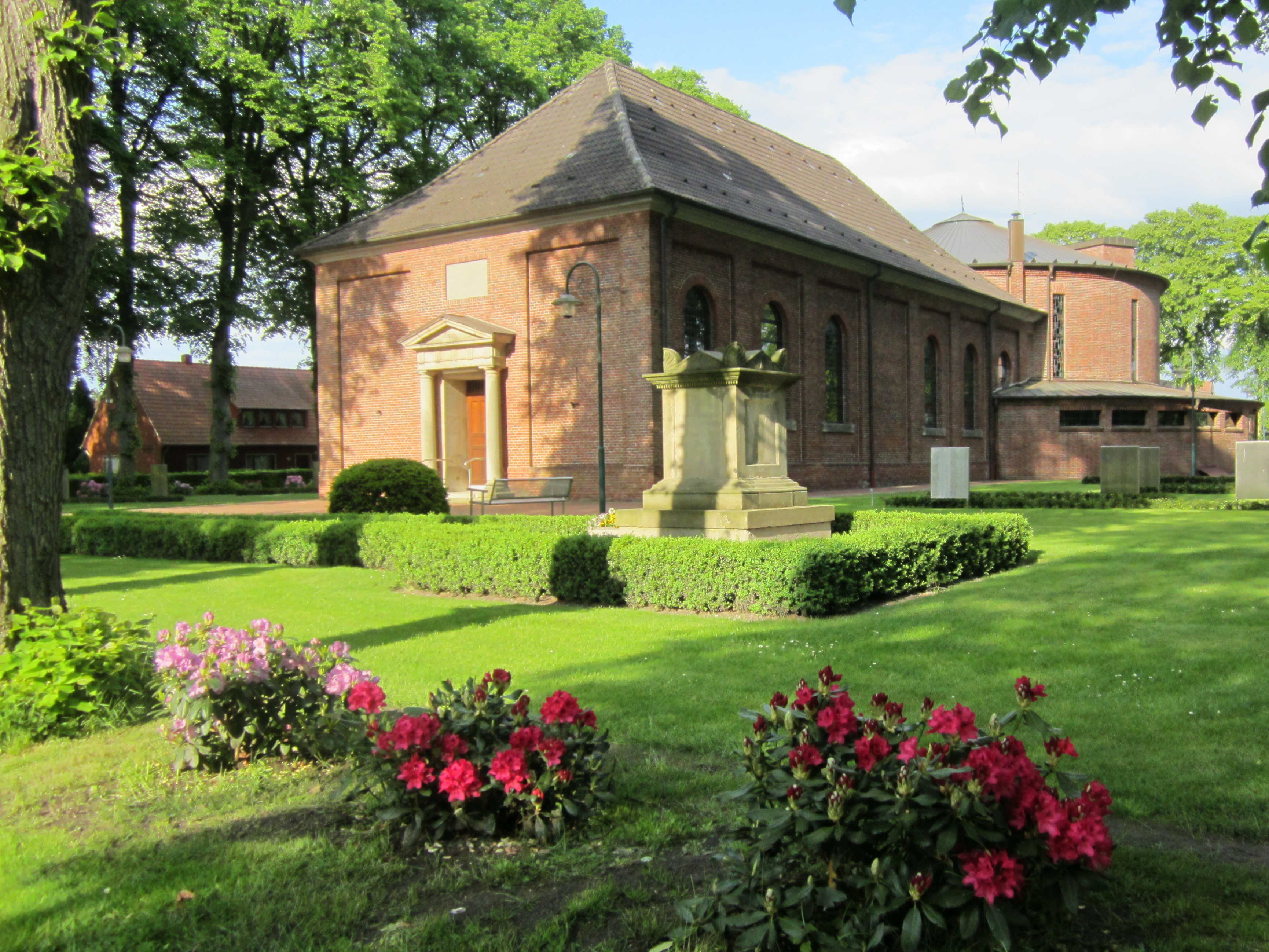 Pfarrkirche St. Prosper Gehlenberg und Schücking-Denkmal